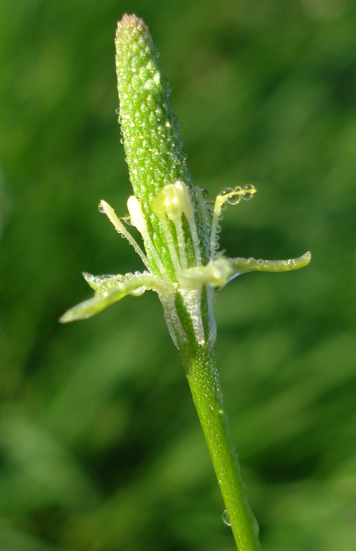 Myosurus minimus (Unterfranken, Germany)